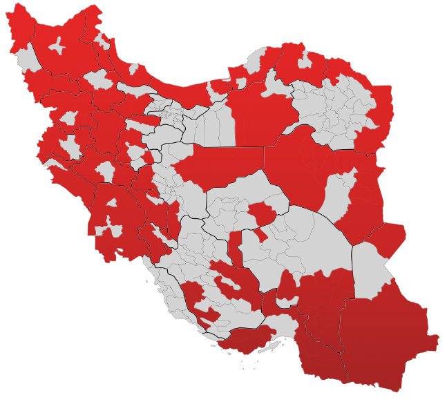 مناطق ممنوع برای اقامت مهاجرین افغانستانی در ایران